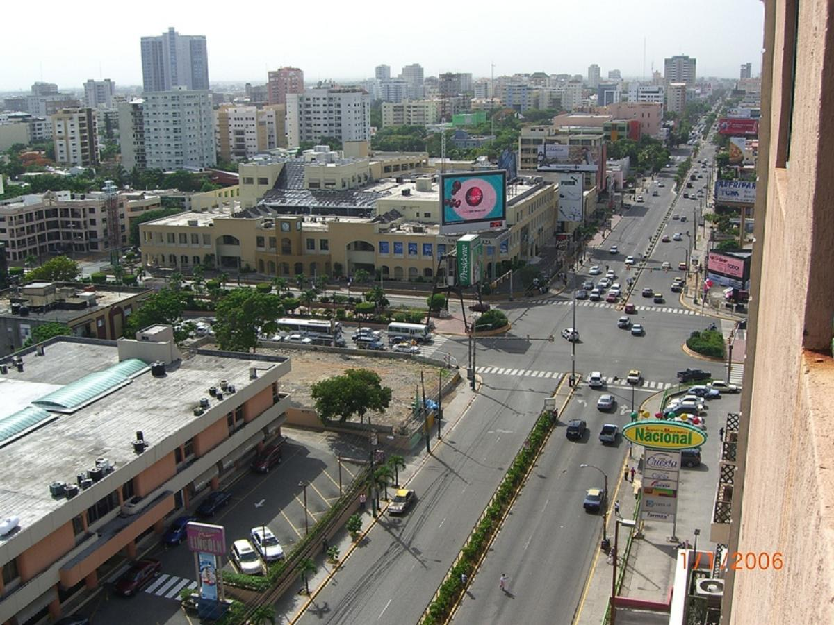 Poligono Central, kruising 27 de Febrero met (Maximo Gomez)